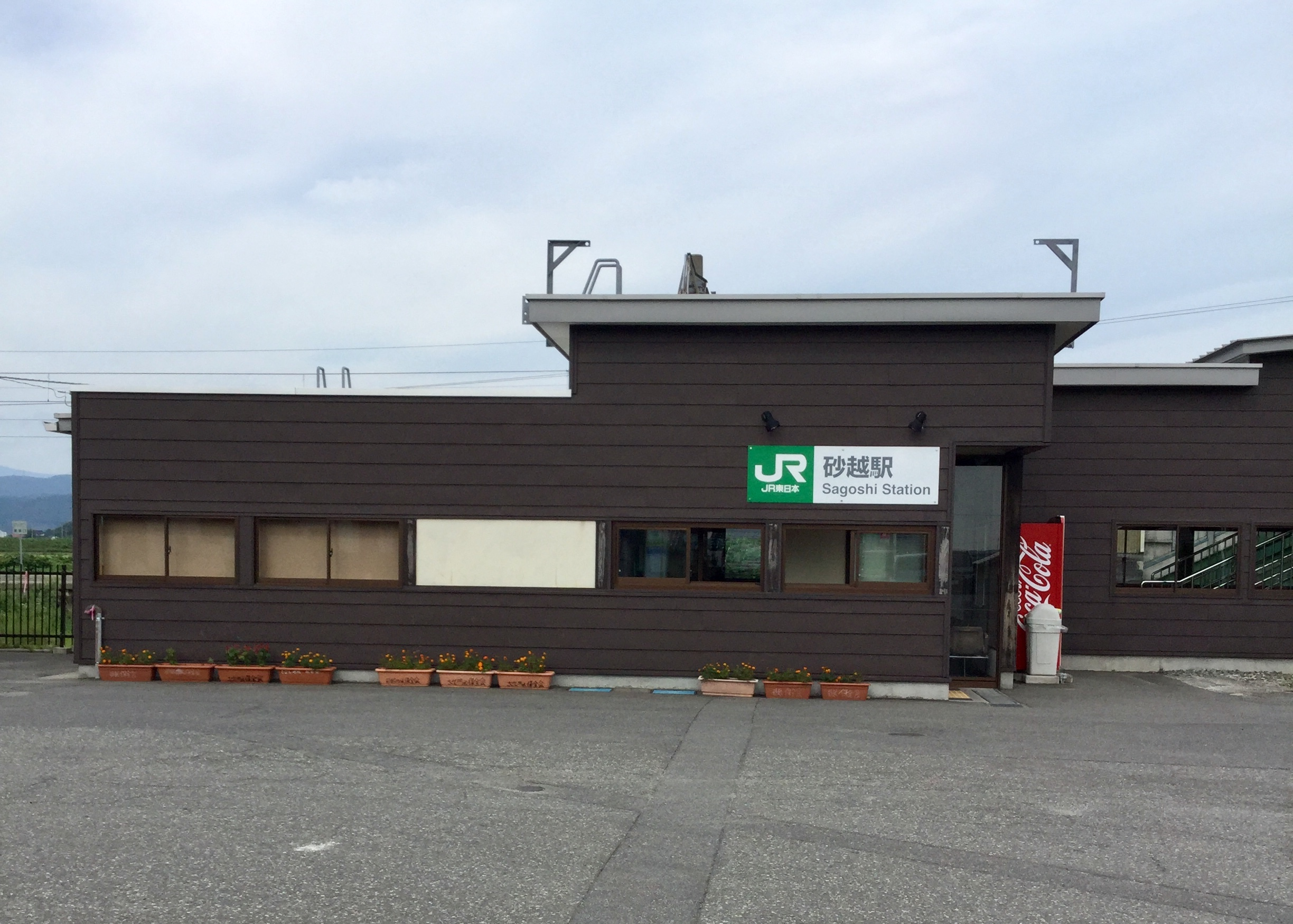 砂越駅新駅舎